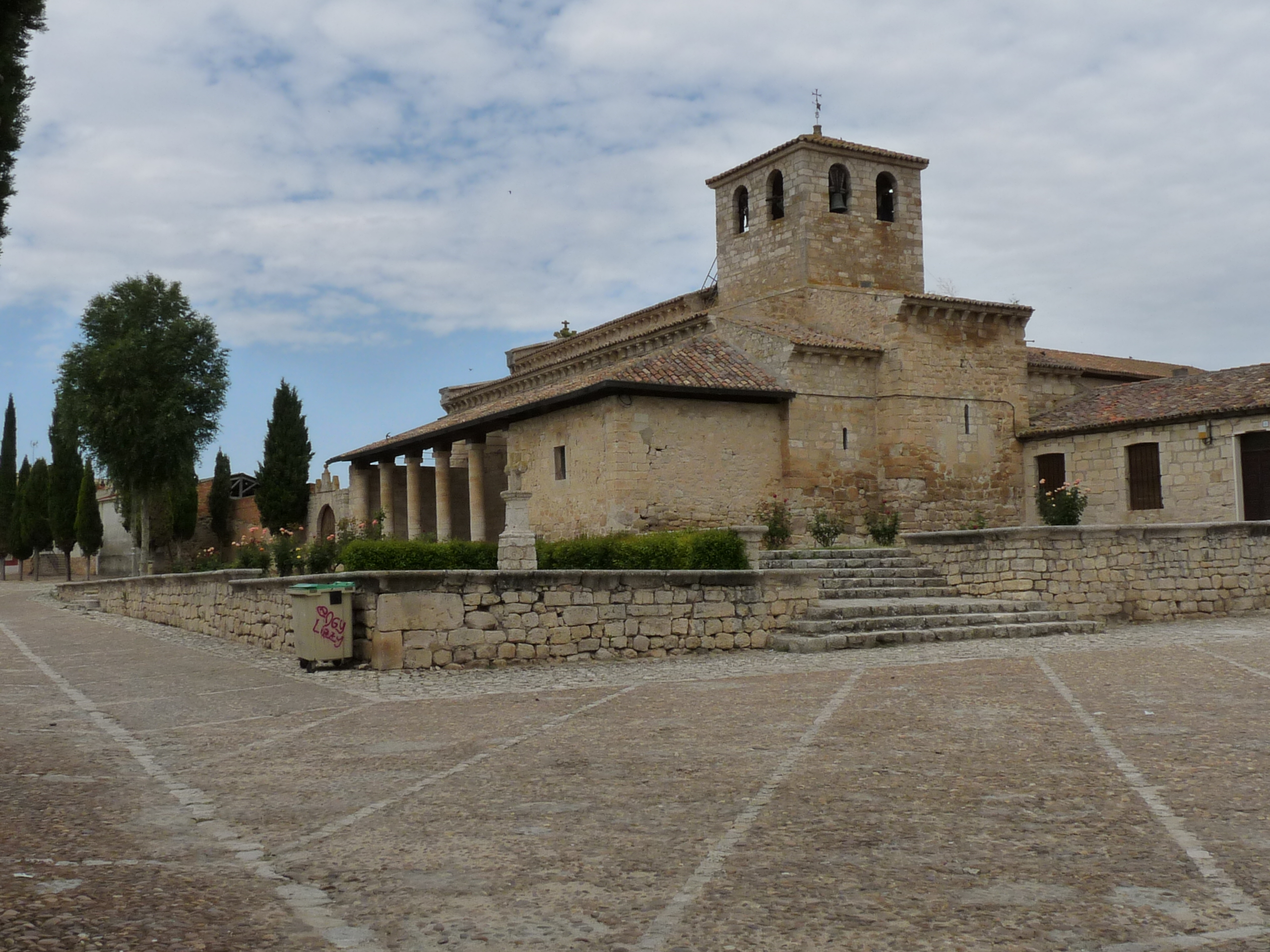 Vista de la Iglesis de Santa Maria de Wamba desde la plaza que grande de Wamba, provincia de Valladolid